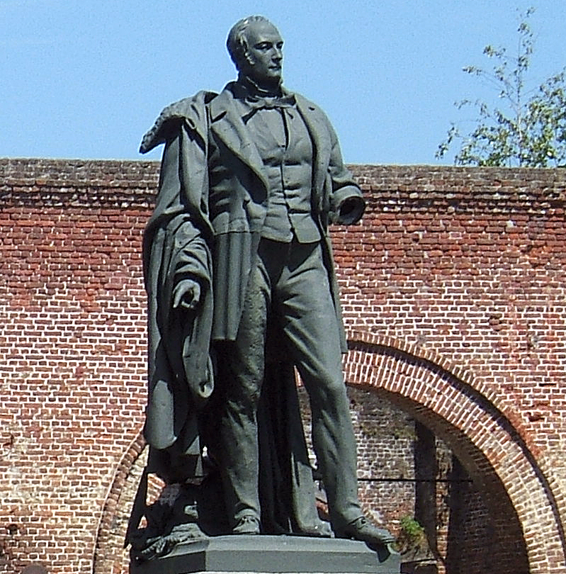 Détail de la statue d'Henri de Gorge sur le site du Grand-Hornu.